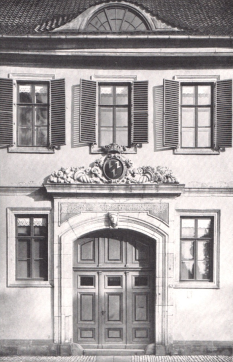 Hildesheim, Bischofspalais, Portal vor 1945, mit Brabeckschem Wappen und Inschrift